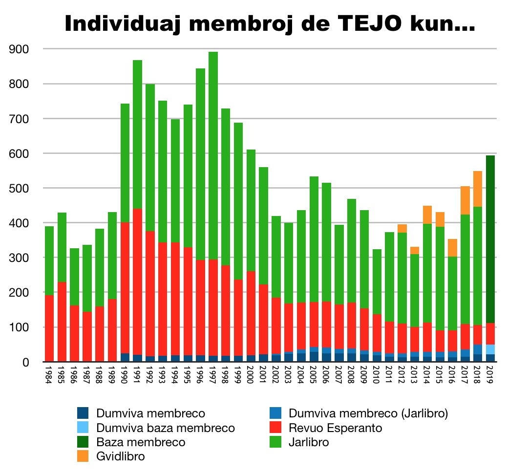 Statistiko pri la individuaj membroj de TEJO dum la pasintaj tridek jaroj